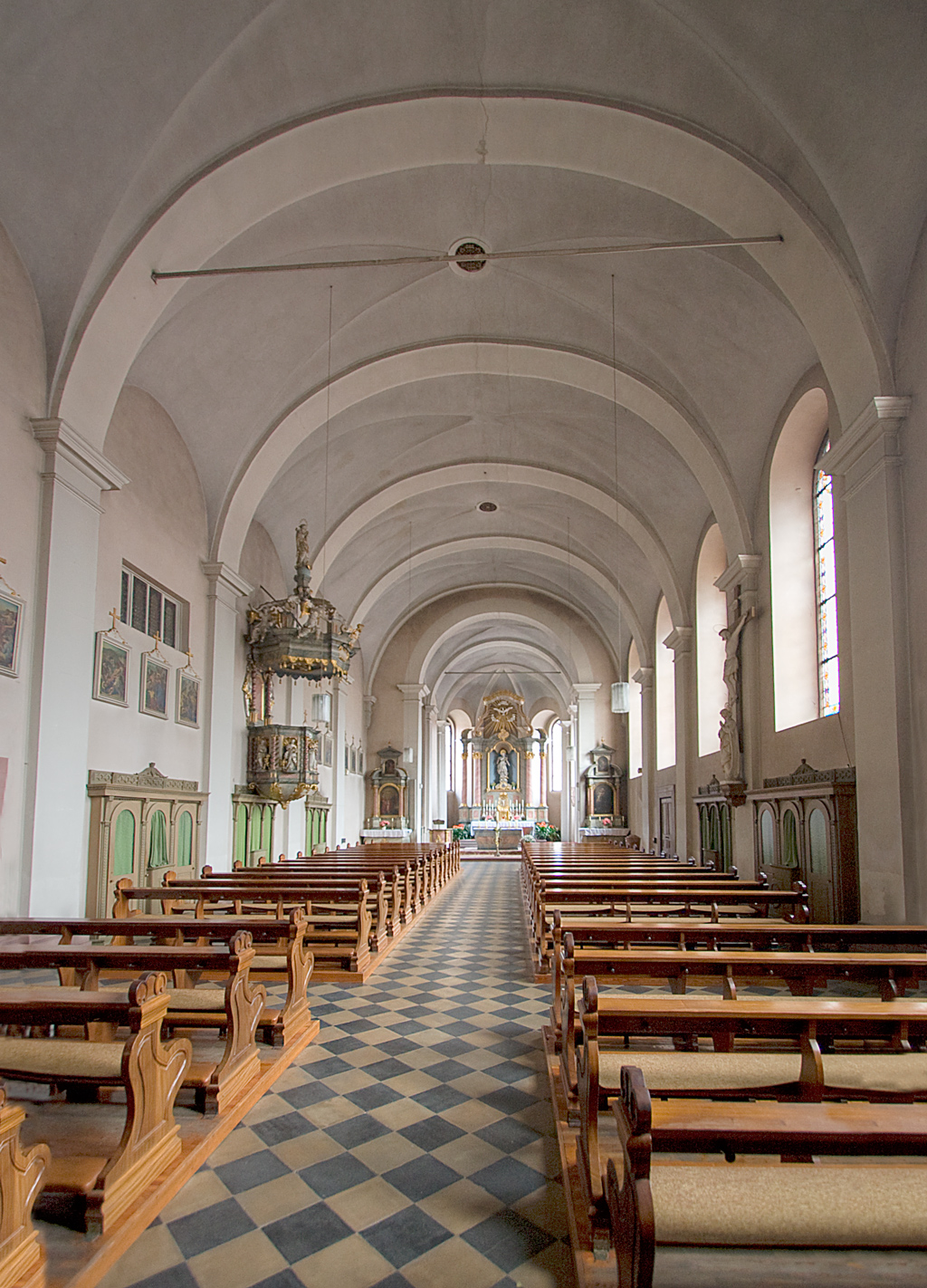 Franziskanerkloster in Miltenberg